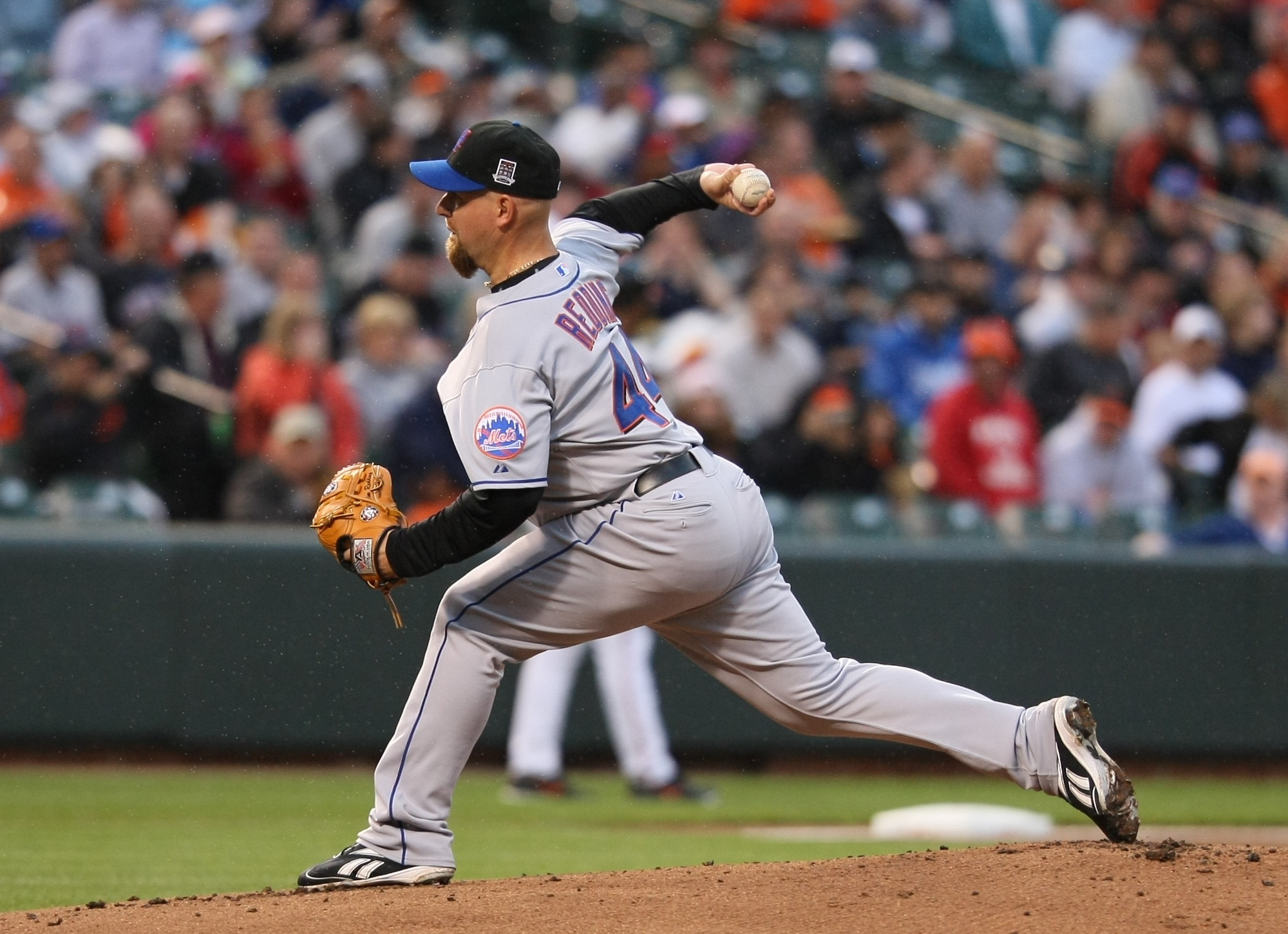 Tim Redding